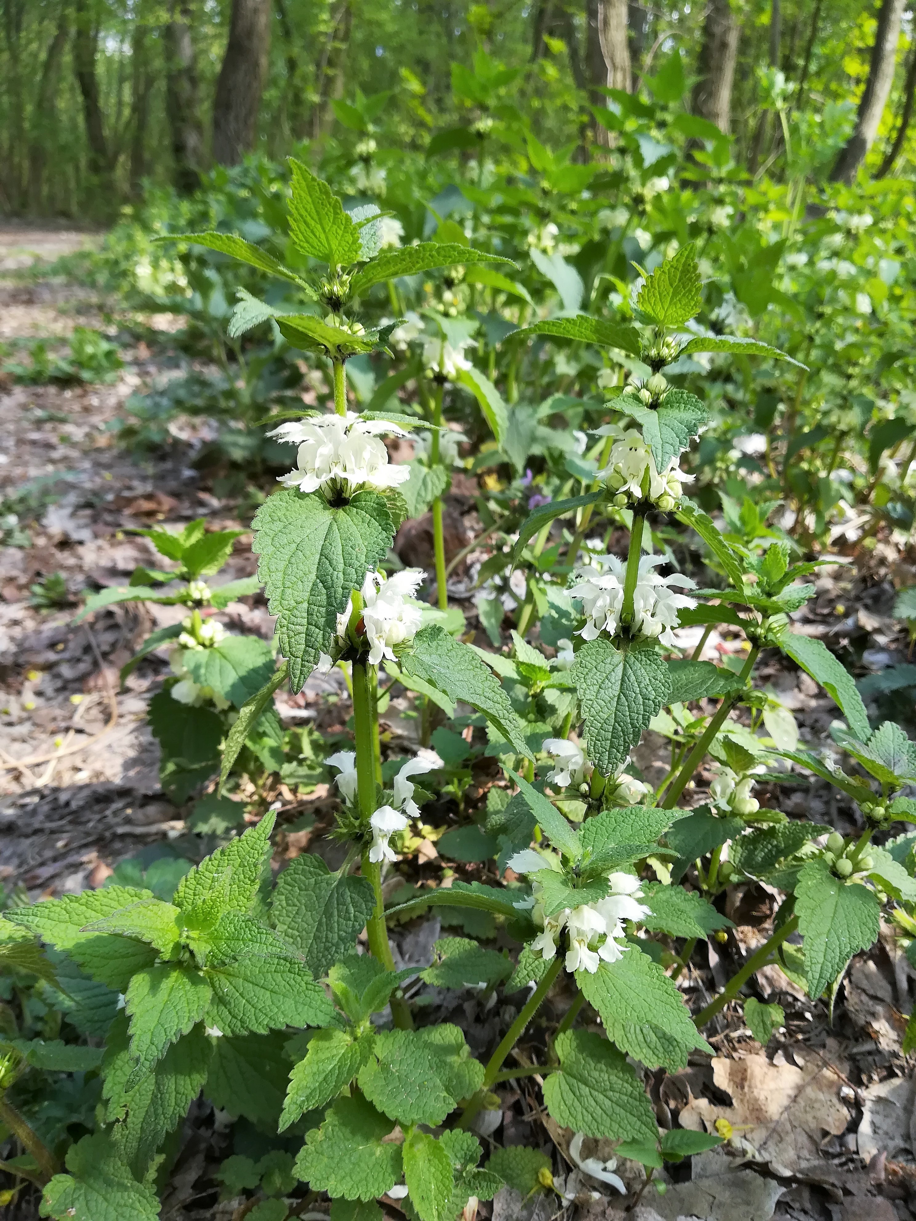 Roślinność znad Rusałki w Poznaniu.